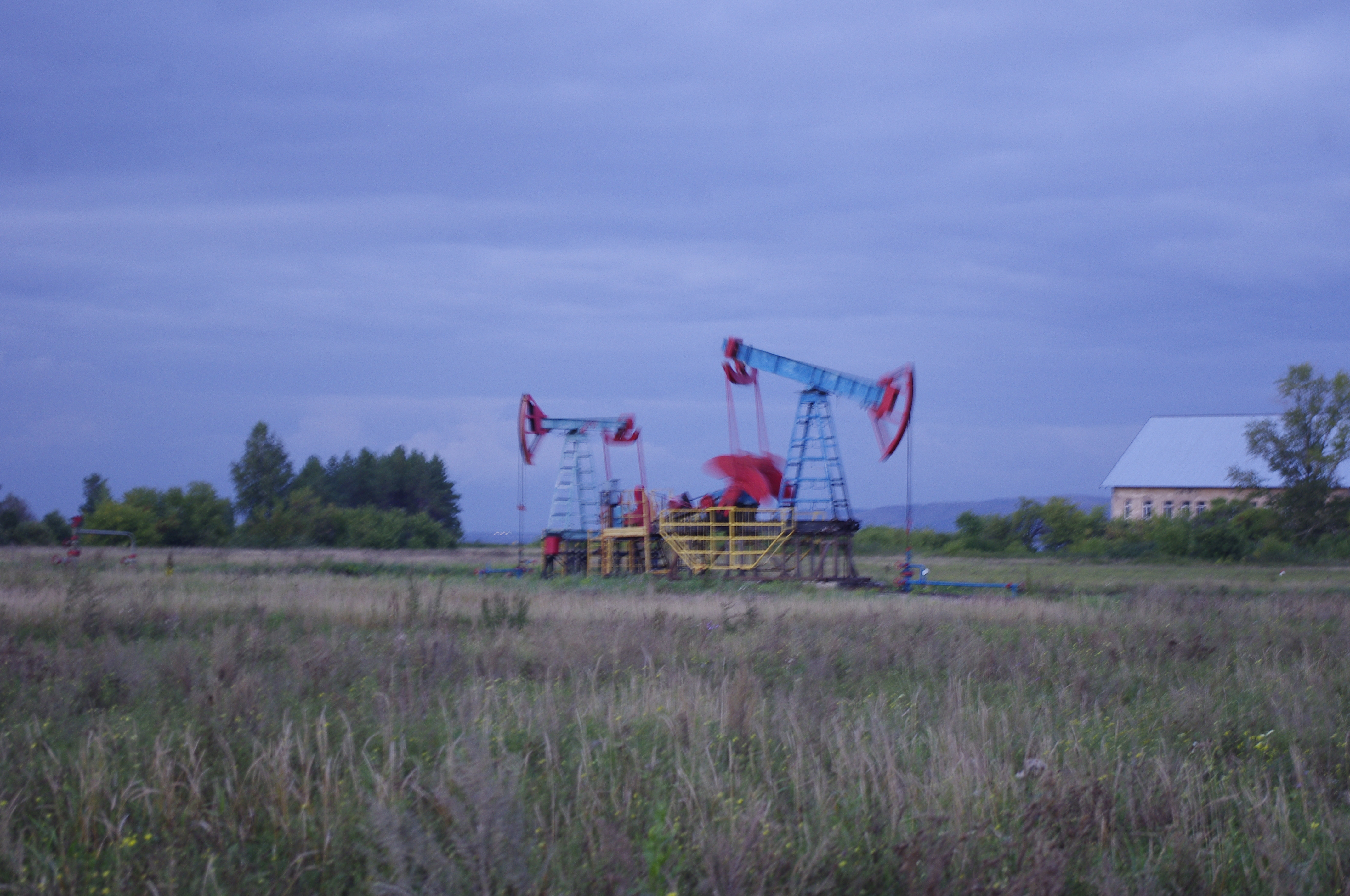 Tatarstan, lato 2013.